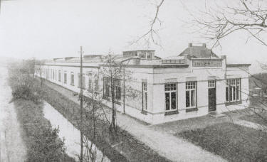 Inventum fabriek 1921 aan de Leijenseweg, Rechts boven de fabriek de kap van villa "De Leije" van toen directeur Hinlopen.